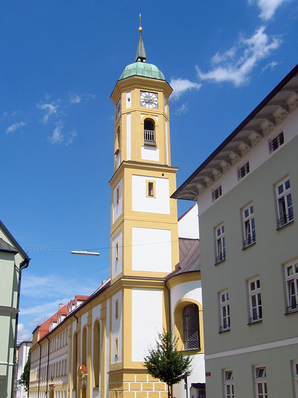 Freising, Heiliggeistspital mit Heiliggeistkirche (1686)